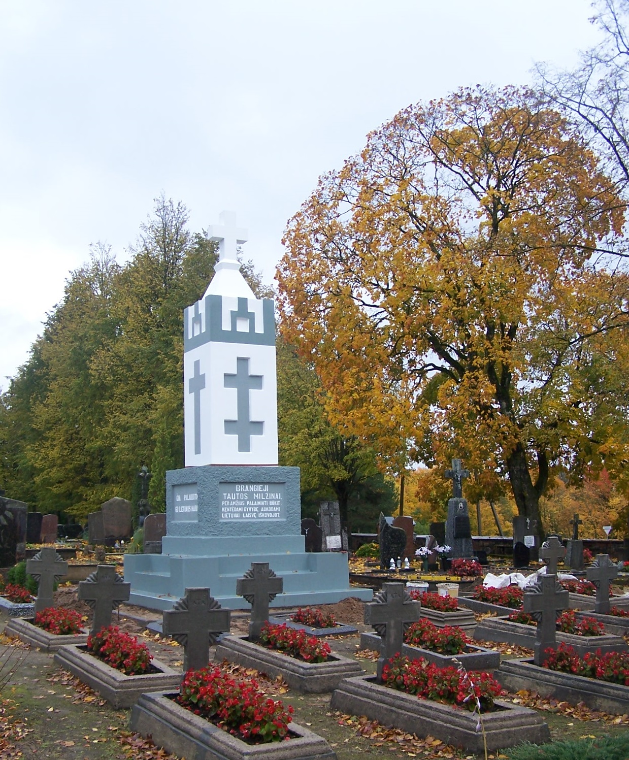 Lietuvos karių kapinės Kupiškyje